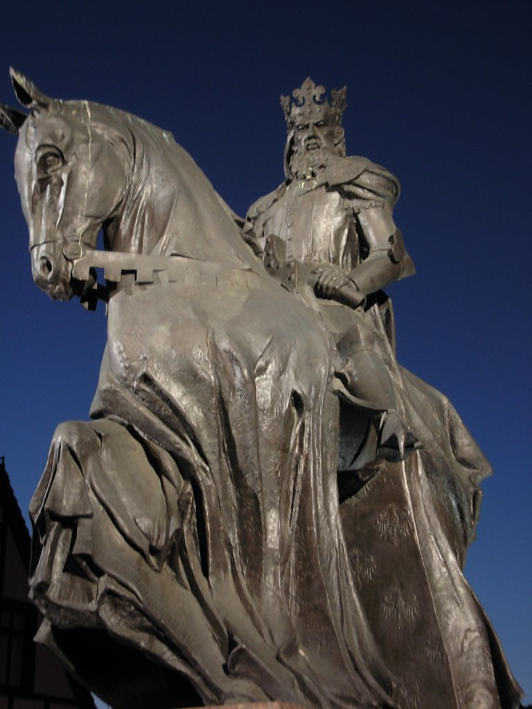 Pomnik Kazmierza Wielkiego w Bydgoszczy